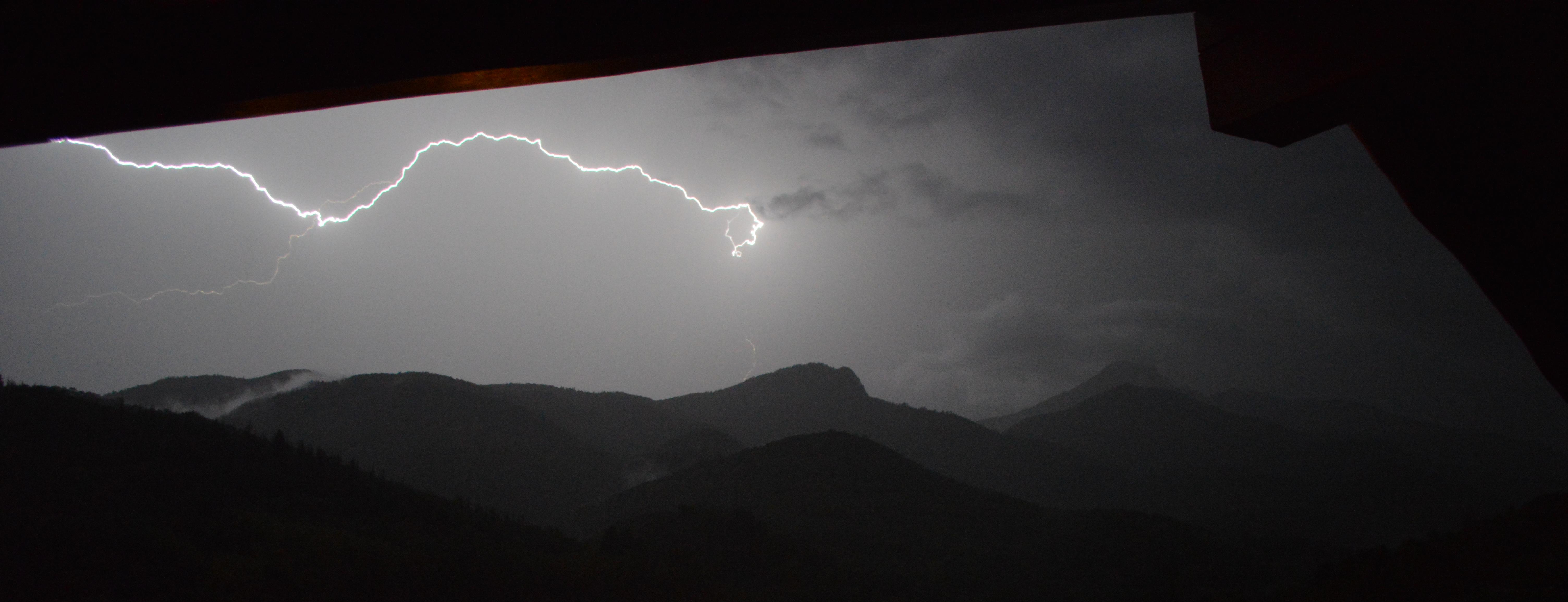 Llampec sobre el turó d'Arenys (Montseny) la nit del 9 de setembre de 2016.